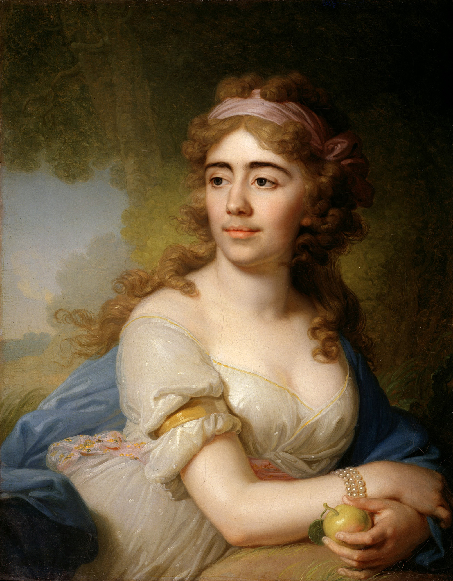 Скобеева (имя ее неизвестно) — дочь кронштадтского матроса, воспитанница и фаворитка Д.П. Трощинского, статс-секретаря Екатерины II.